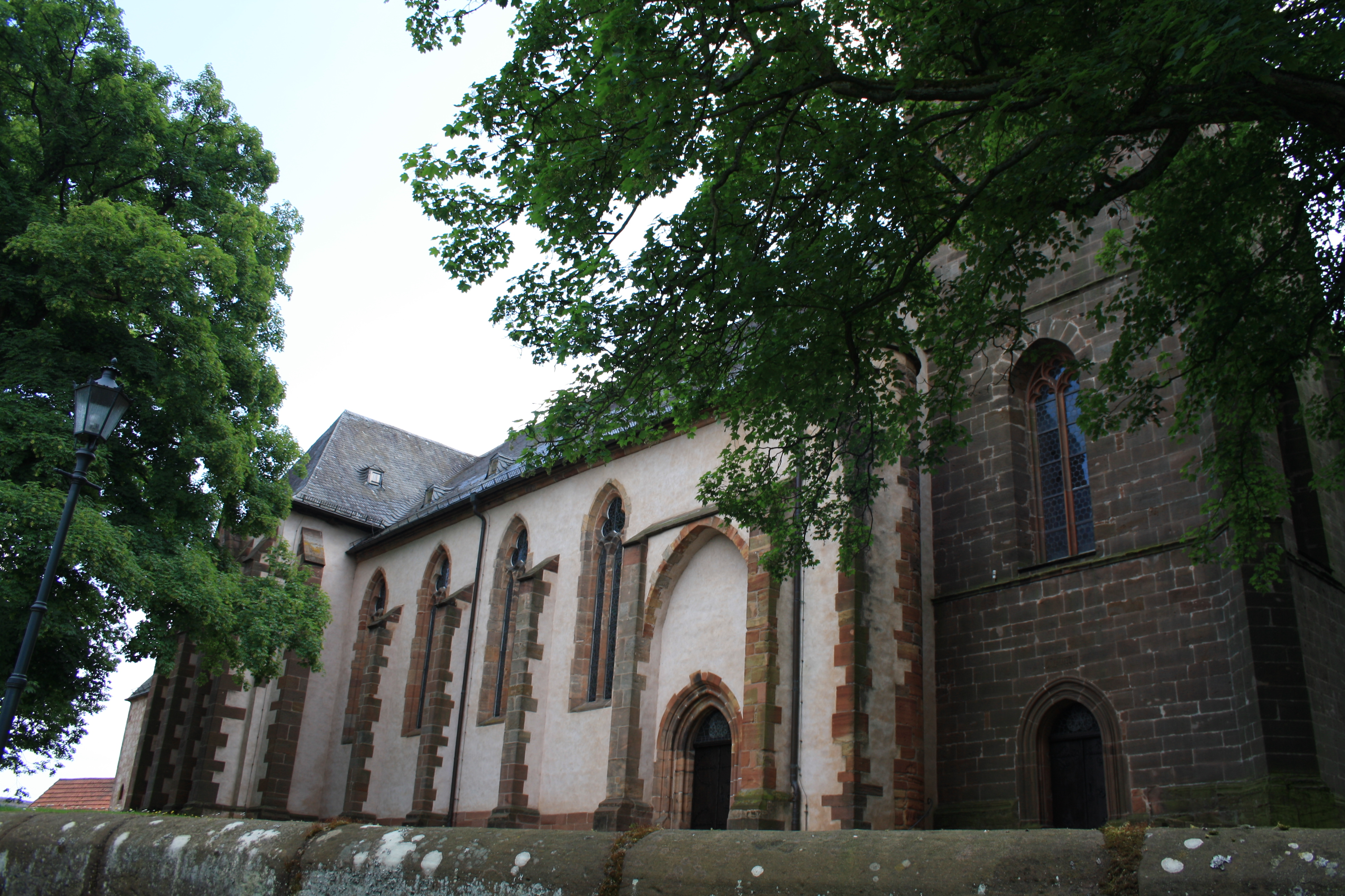 Stiftskirche in Wetter (Hessen) von Nord-Westen